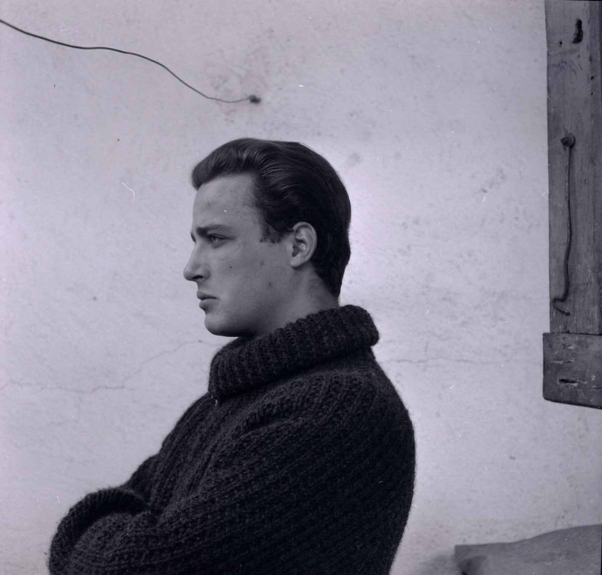 Località non identificata. Ritratto di Cassinelli. Servizio fotografico : Italia, 1965 / Paolo Monti. - Buste: 25, Fototipi: 25 : Negativo b/n, gelatina bromuro d'argento/ pellicola ; 6x6. - ((Serie costituita da 25 negativi identificati con i nn.: R14207-14226. Sulla busta del negativo R14207 manoscritto: "Cassinelli". La suddetta serie è contenuta nella scatola identificata con la numerazione R14207/R14356. Sul coperchio della scatola, manoscritto a pennarello: "Ritratti".